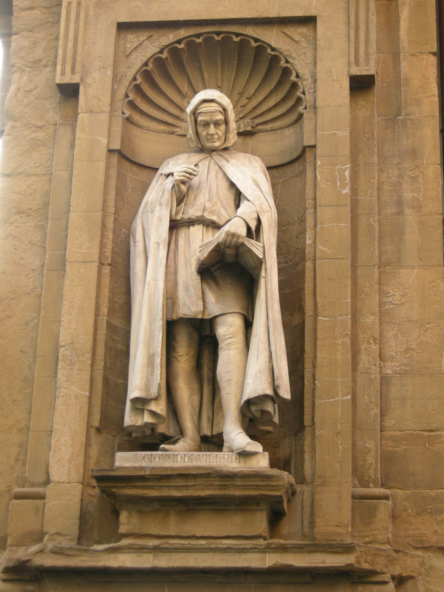 Loggia del mercato nuovo, giovanni villani